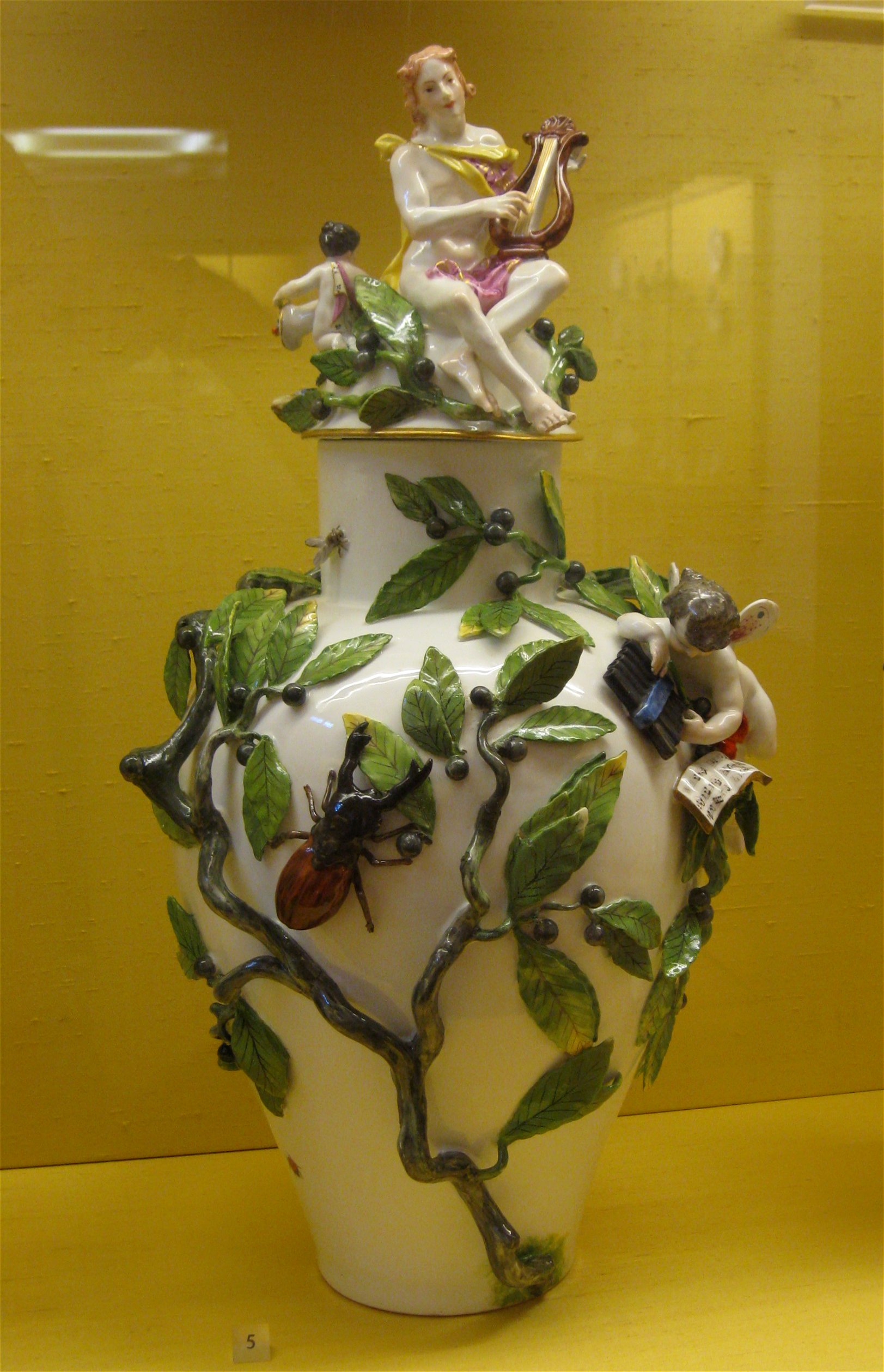 Apollovase, Modell von Johann Joachim Kaendler, um 1745